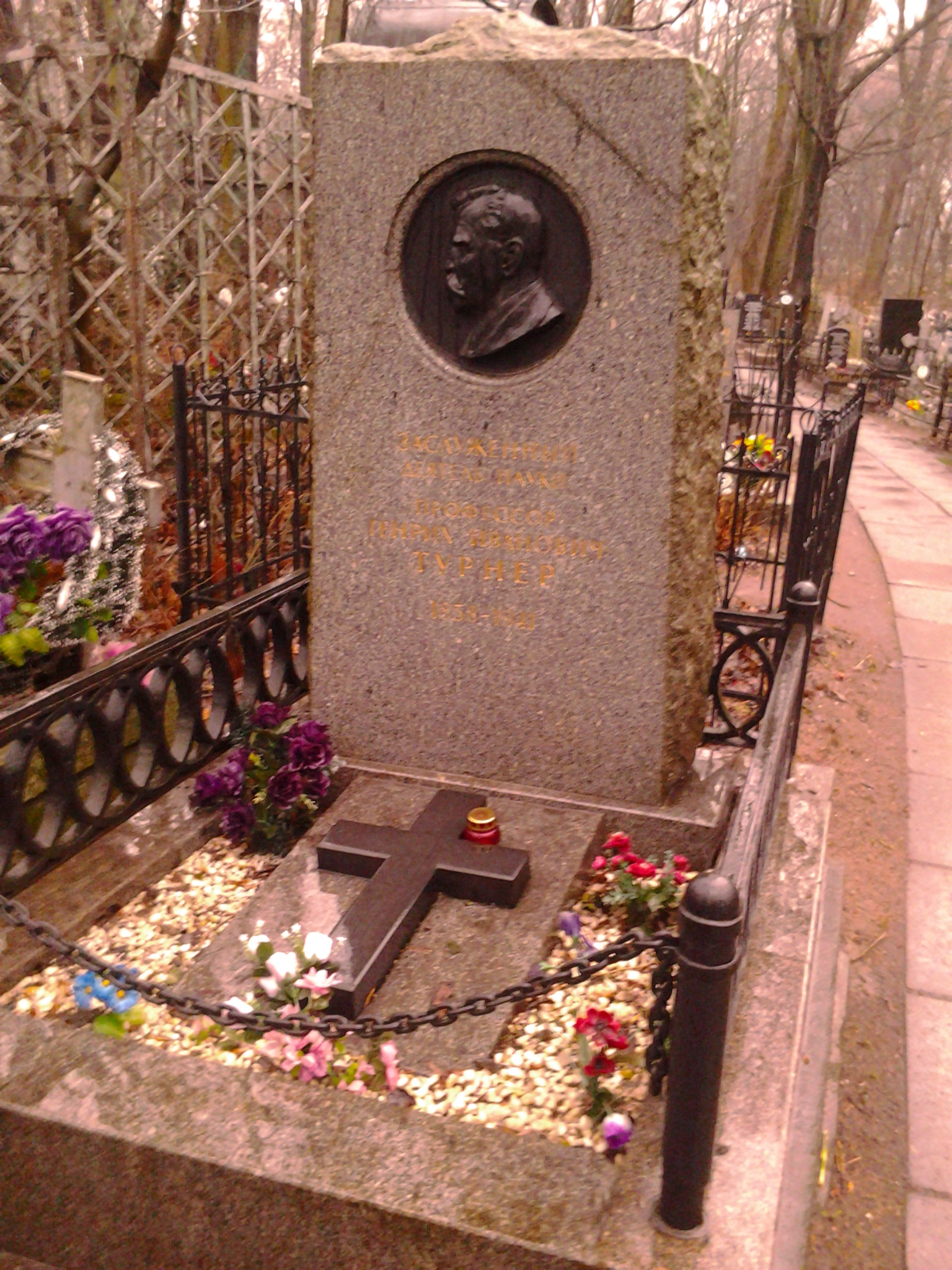 Надгробие Г. И. Турнера на Большеохтинском кладбище Санкт-Петербурга.